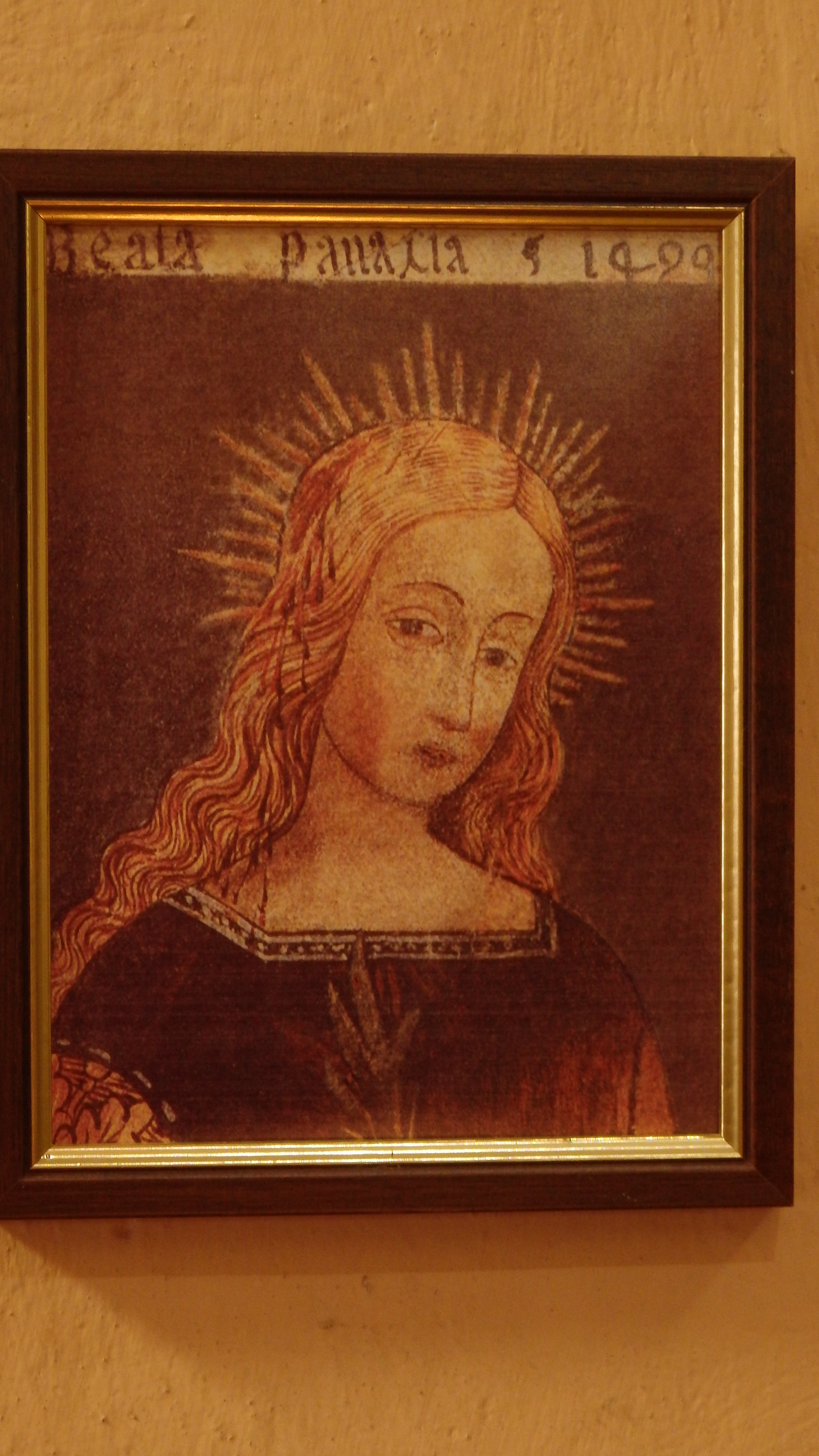 Chiesa di San Rocco This is a photo of a monument which is part of cultural heritage of Italy.